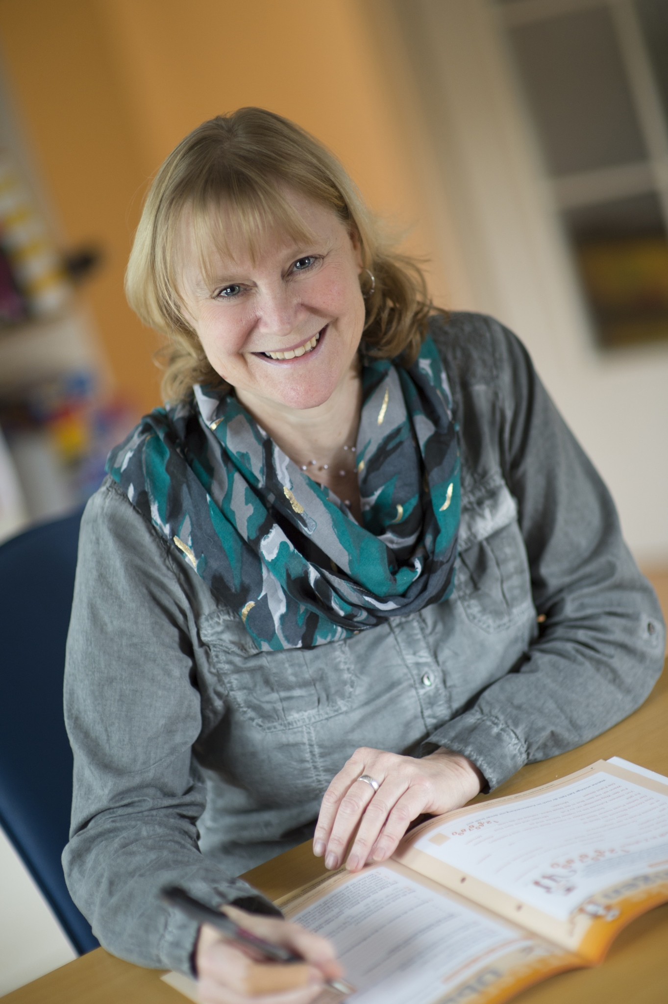 Diplom Pädagogin Uta Reimann-Höhn